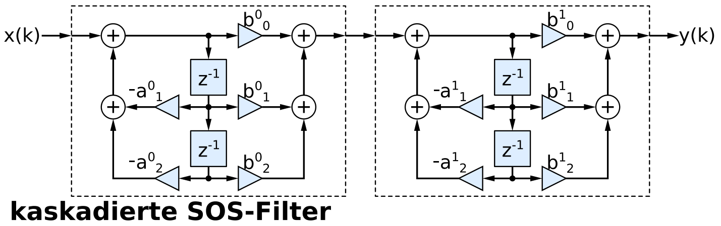 kaskadierter SOS